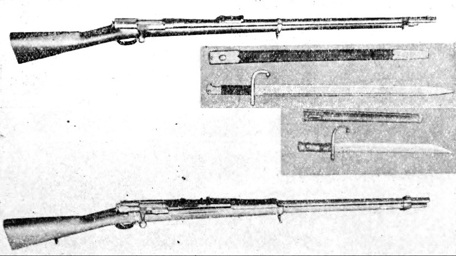 村田銃と銃剣